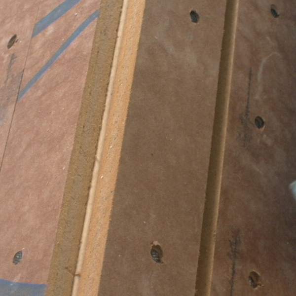 欠陥住宅_木造_釘_02